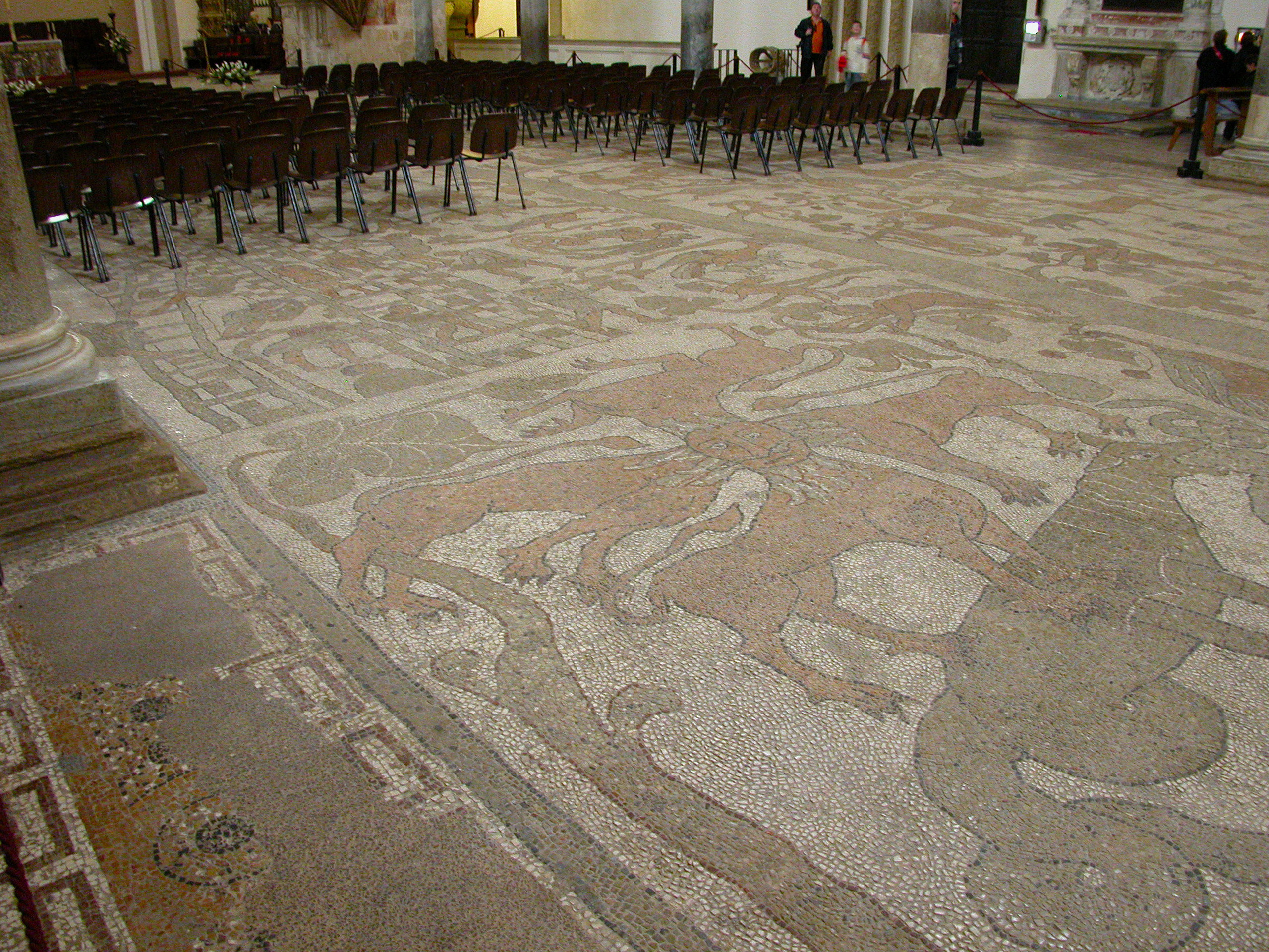 Autore e data: Stefano Trezzi (yoruno sparisci sott'acqua 13:58, 6 mag 2007 (CEST)) Fonte: scatto da me eseguito. Descrizione: Otranto, cattedrale, 26 aprile 2007 Licensing Licenza d'uso: Creative Commons BY-SA 3.0